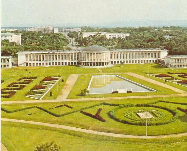 Palais de la Nation, à Kinshasa, Bureau du Chef de l'État.